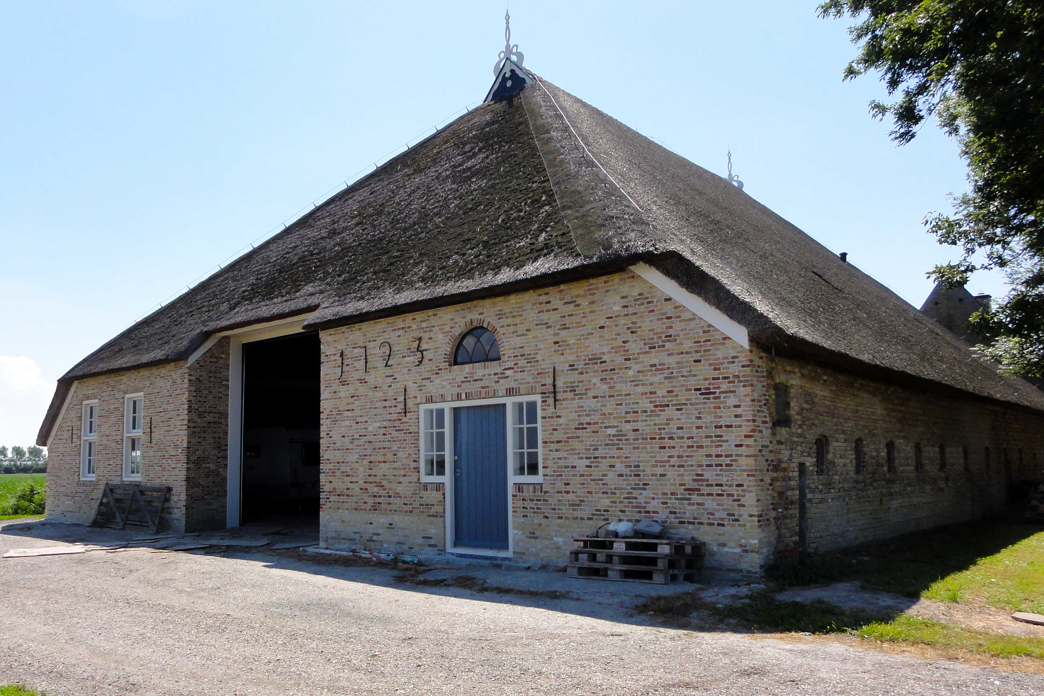 Boerderij Vishorne in Strand nabij Pingjum in Friesland